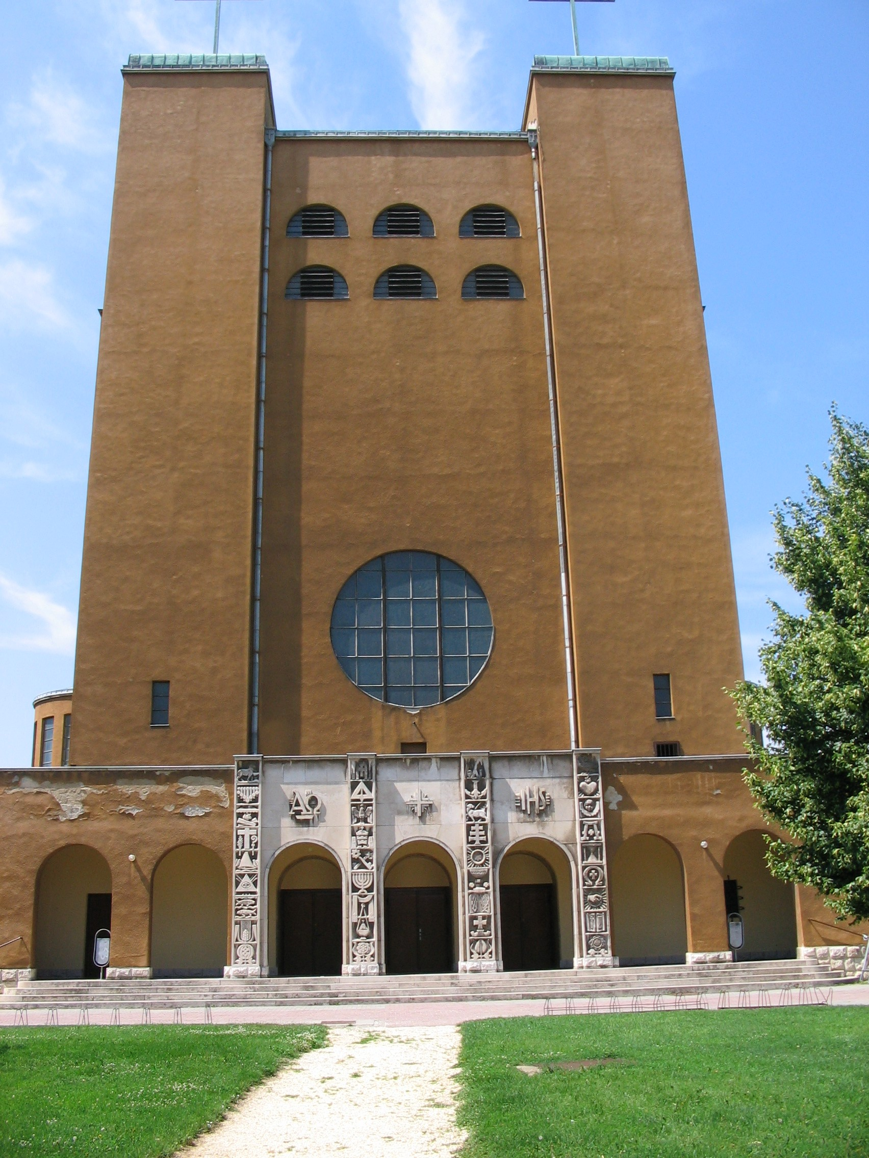 Csorna, Jézus Szíves r.k. templom. Épült 1936 és 1938 között Körmendy Nándor tervei szerint